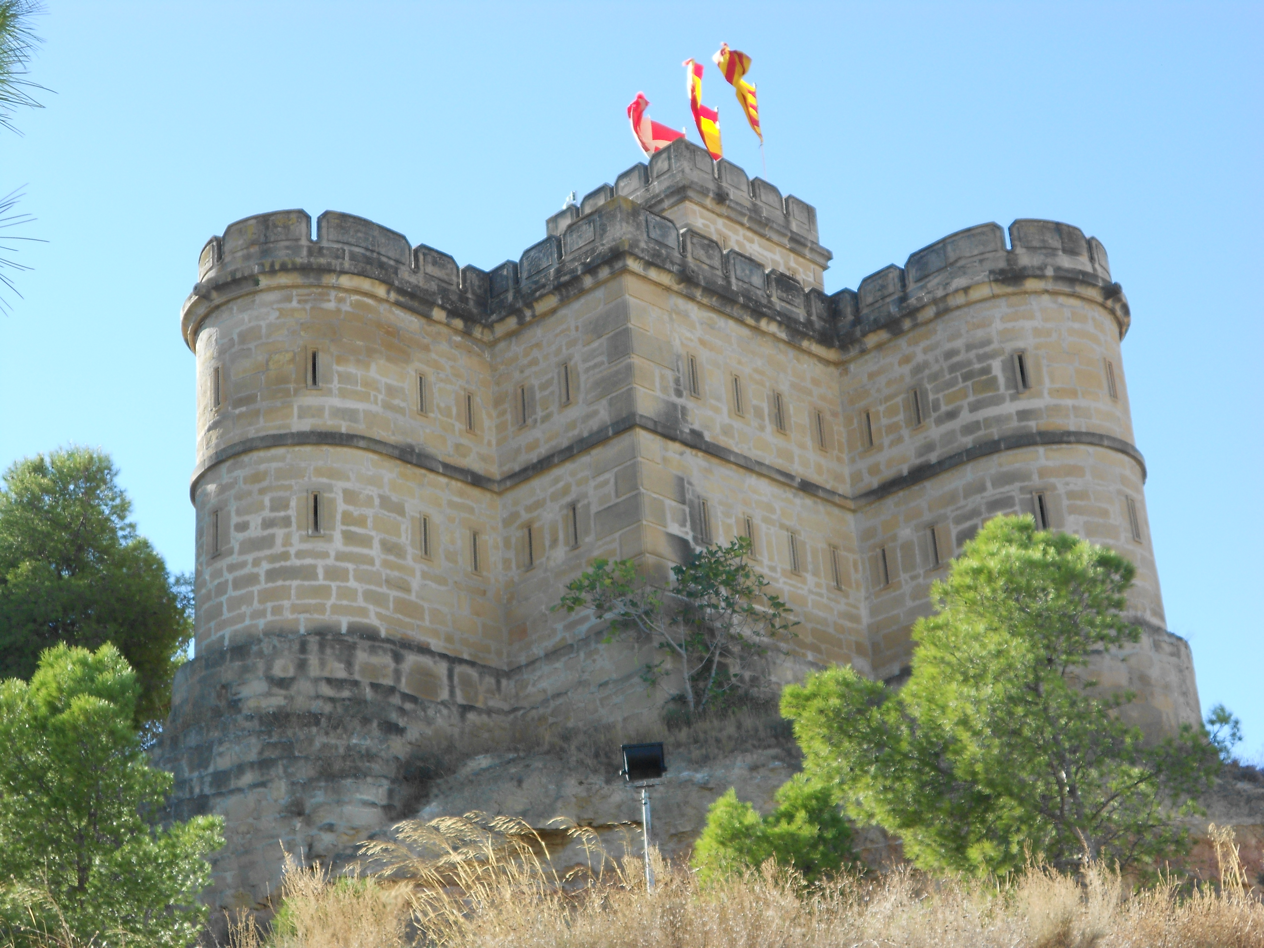 Torre de Salamanca de Caspe (España). Fue construida por orden del general Salamanca en la última guerra carlista —la tercera—, en 1874, siendo el castillo más moderno de Aragón. Alberga el Museo de Heráldica, que recoge los símbolos heráldicos que fueron propios de la Corona de Aragón.